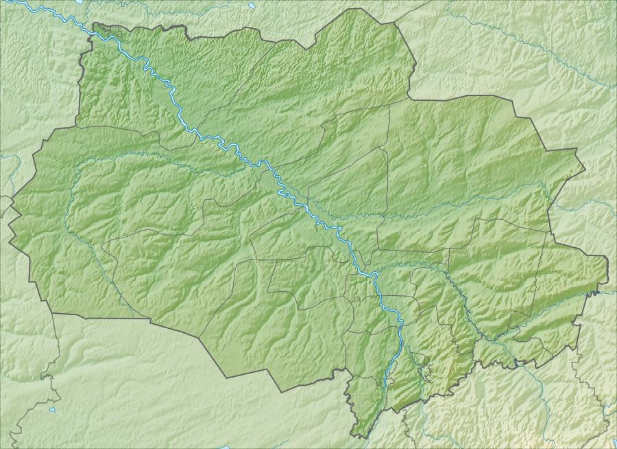 Физическая карта Томской области, Россия. Проекция: Меркатор Координаты для GMT: -R74.86/89.58/55.54/61.14 Инструменты: GMT, Inkscape This map may be incomplete, and may contain errors. Don't rely solely on it for navigation.